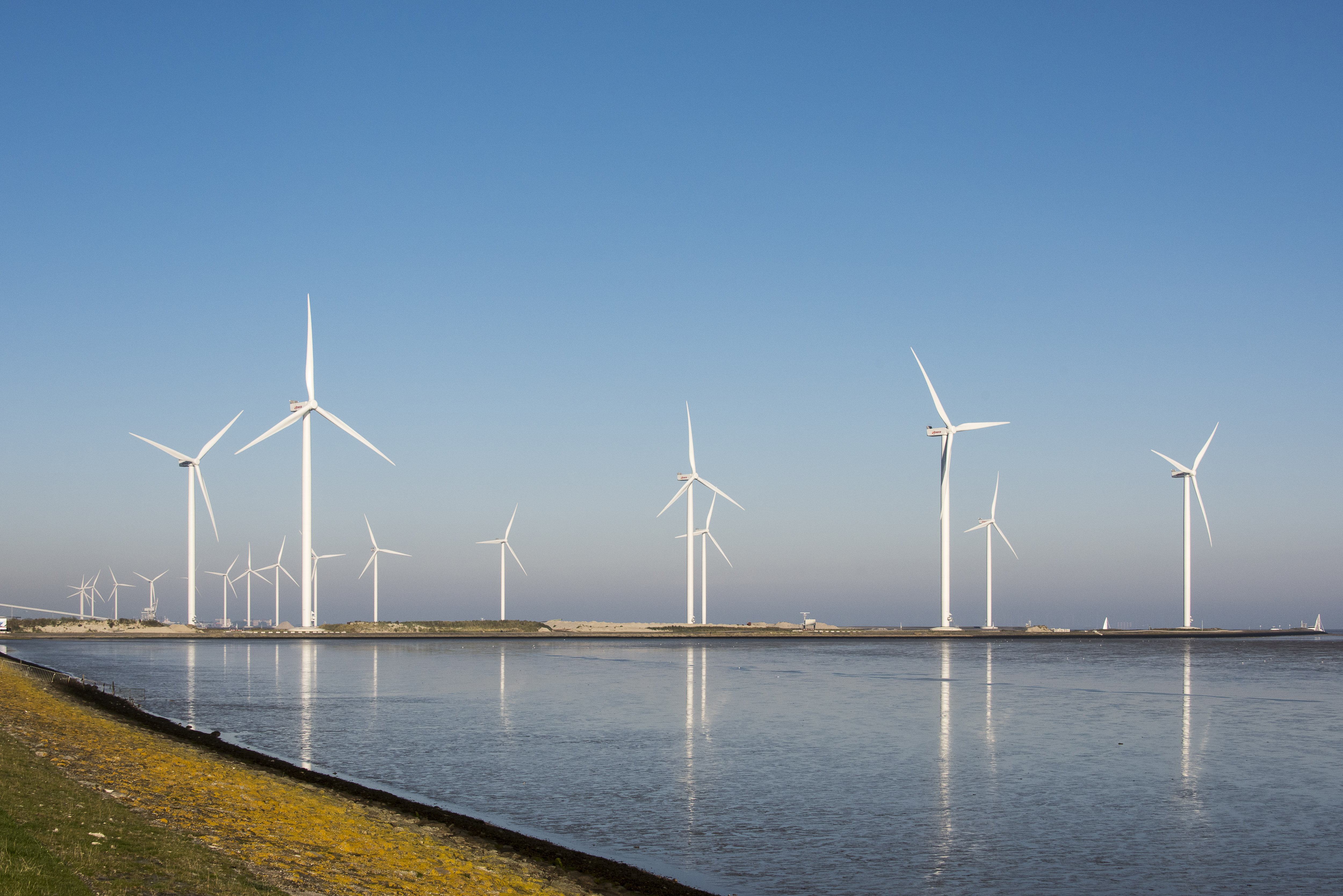 Windpark Delfzijl, Niederlande Zwischen Emsmündung und Nordsee stehen 19 Starkwindturbinen a 3,3 MW bei 100m Nabenhöhe. Nordex Delta N100/3300, nearshore[1]